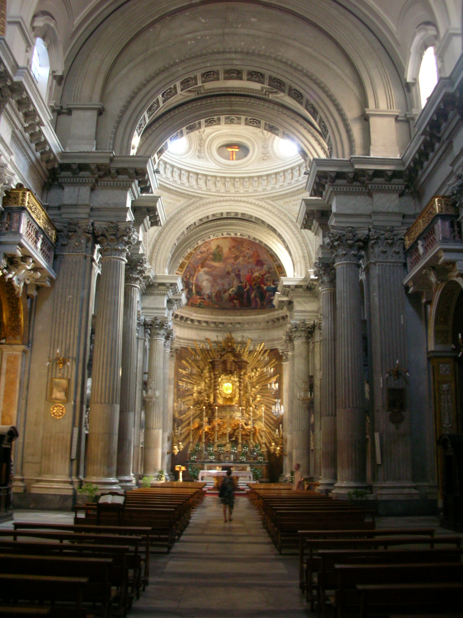 Interior, Santa Maria in Portico, Rome